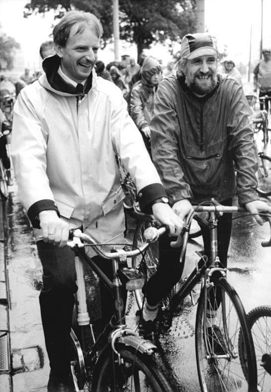 ADN-Häßler 10.6.90 Dresden: Auch Oberbürgermeister Dr. Herbert Wagner (l) ließ es sich nicht nehmen, an der Radfahrer-Demo teilzunehmen. Hunderte Elbestädter begleiteten ihn und erinnerten daran, daß auch die Radfahrer gleichberechtigte Partner im Straßenverkehr sein müßten.